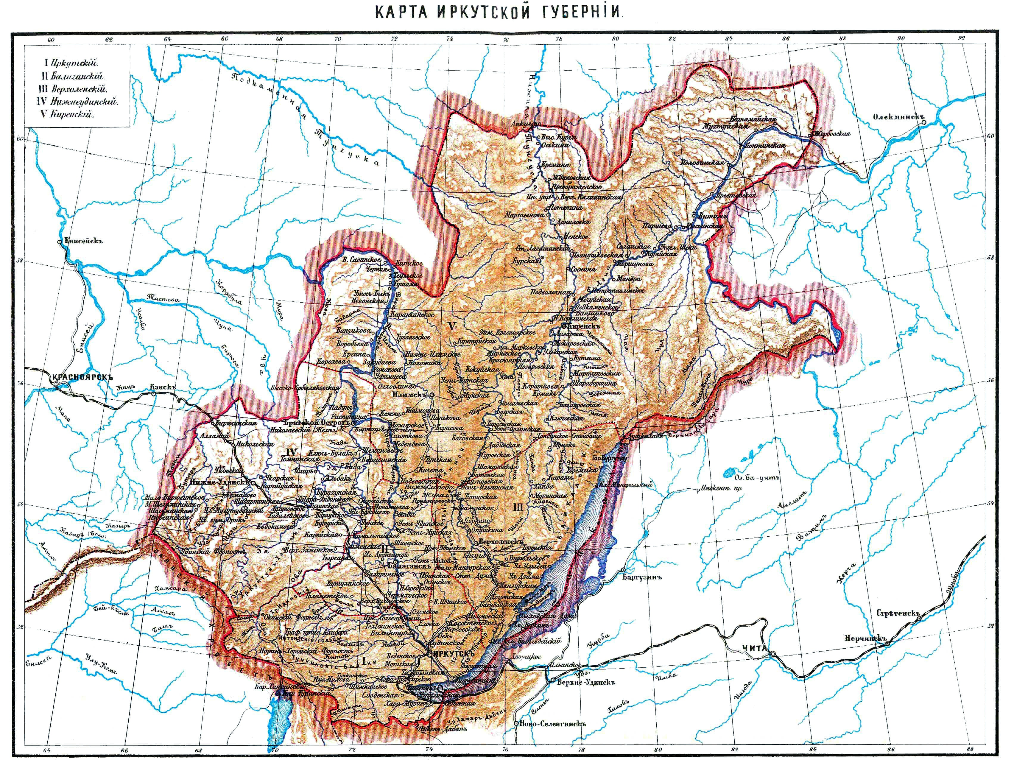 Карта Иркутской губернии, начало 20 века